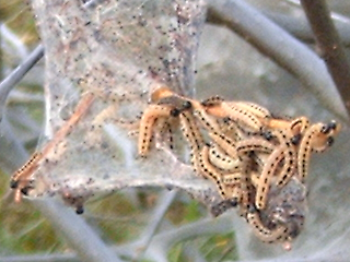 Yponomeuta Evonymella (häggspinnmal, spökträd, ghost tree)